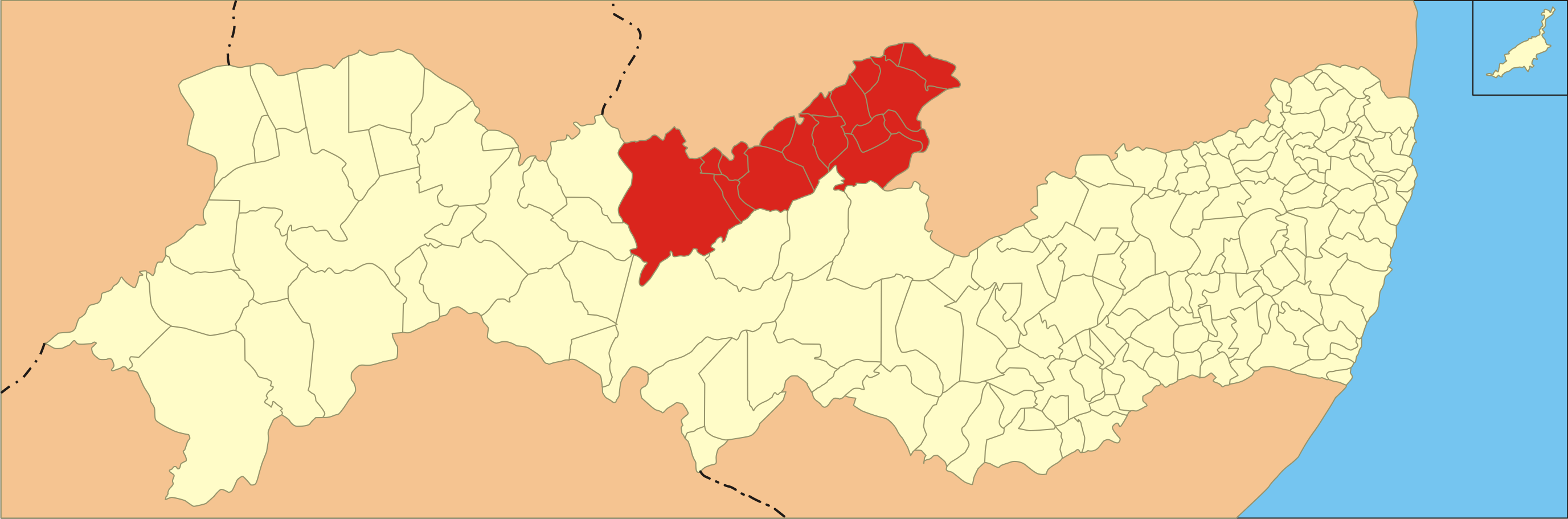 Localização da microrregião no estado de Pernambuco.